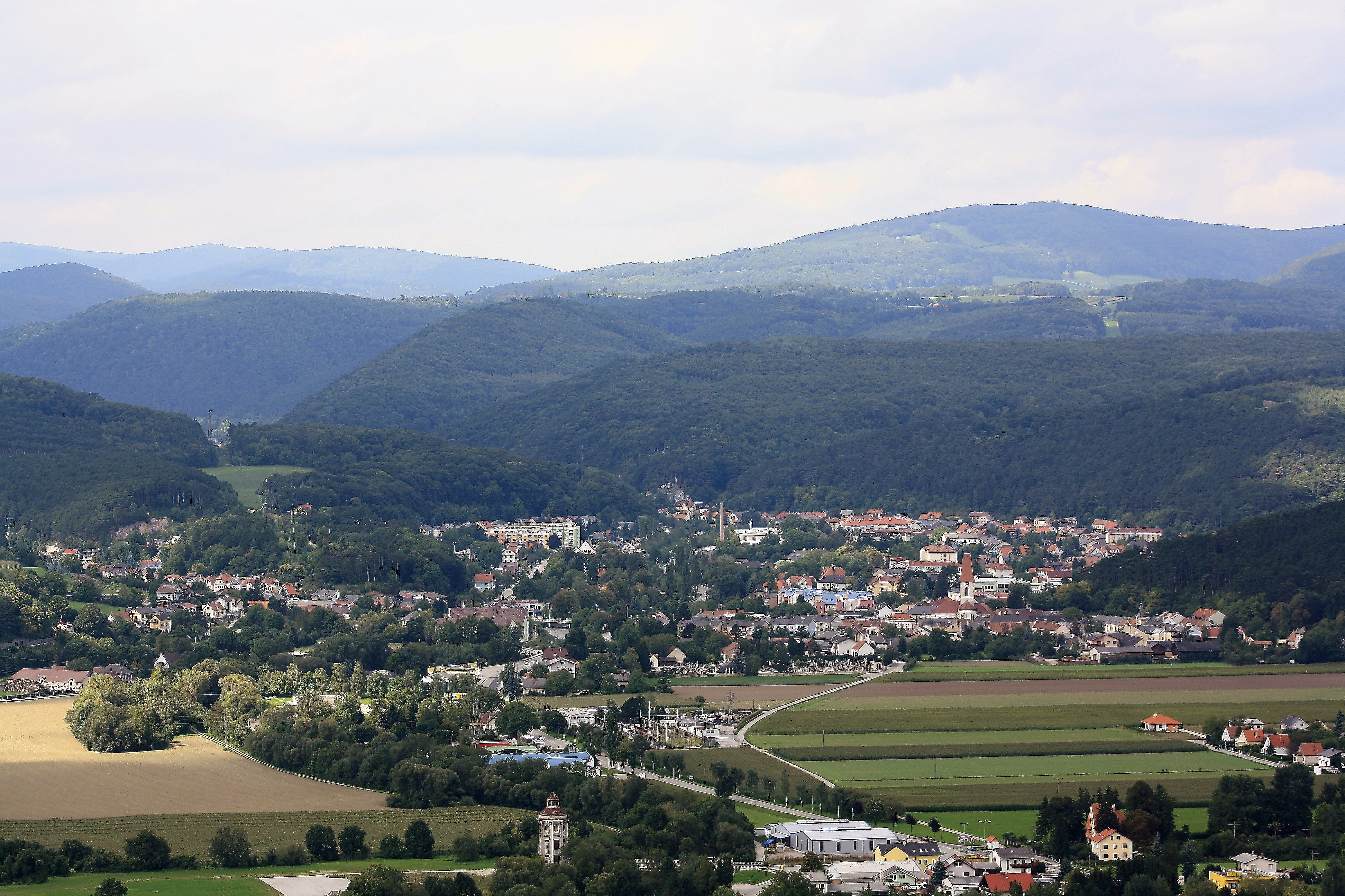 Südostansicht von Pottenstein